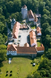 Luftbildaufnahme des Schlosses Aschhausen